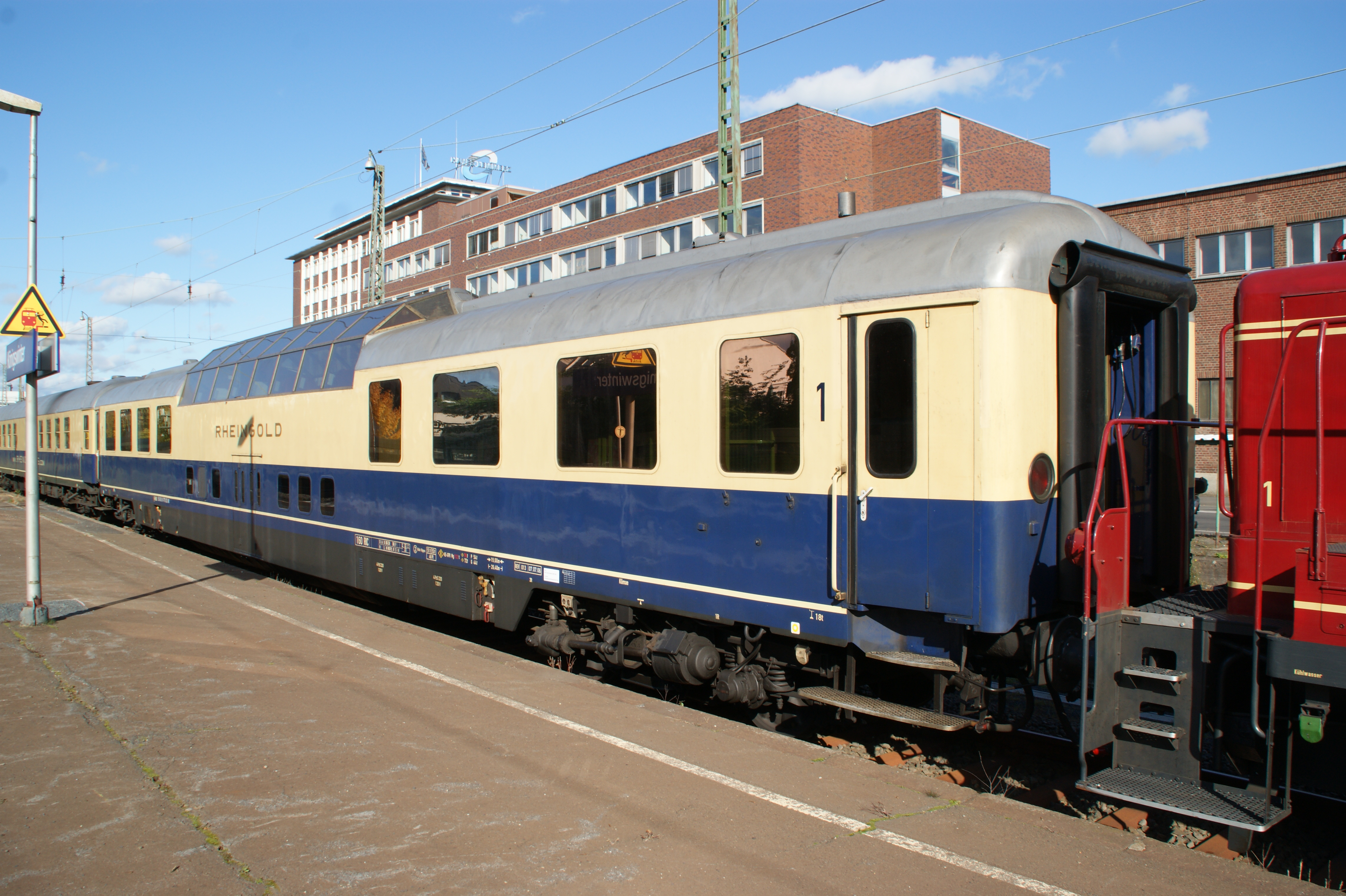 Rheingold-Aussichtswagen in Königswinter